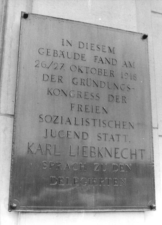 Für Bezieher des ADN-Reportagedienstes! Zum Beitrag: Das historische Haus an der Jannowitzbrücke - Lehrlinge auf den Spuren der FSJ-Gründer und der Masch. ADN-ZB-Sturm 22.12.1983-ha. Diese Gedenktafel findet man seit kurzem an dem großen Bürohaus Schicklerstraße 5-7 in Berlin unweit der Jannowitzbrücke. (Hierzu gehören 193/1222/306-309N)